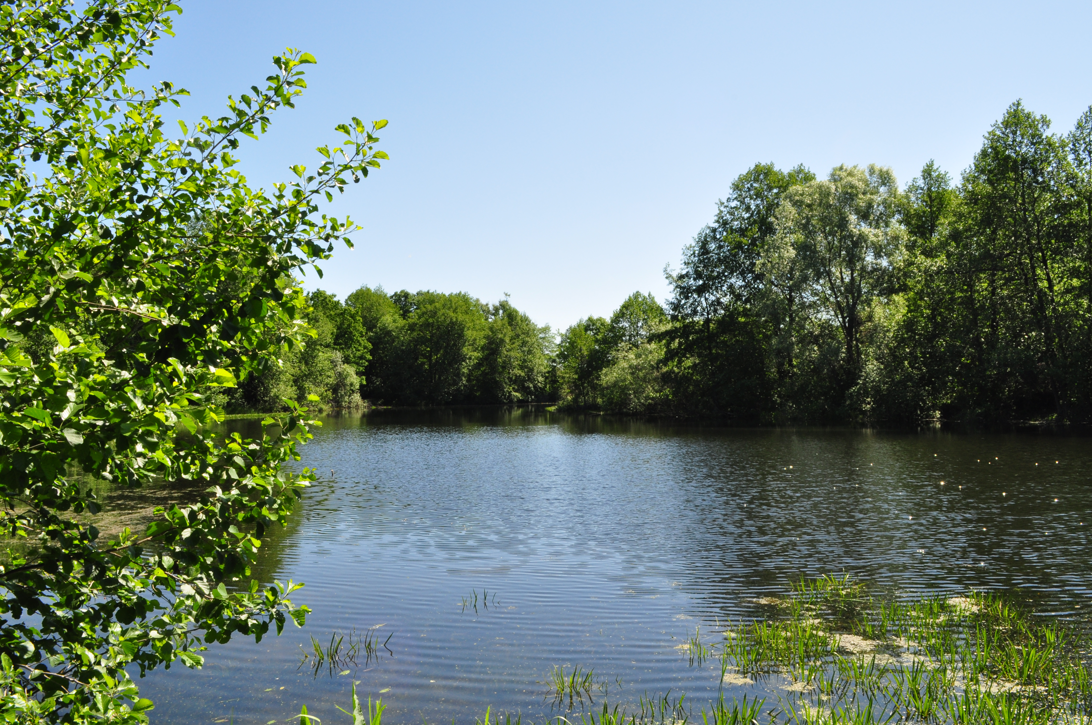 Озеро Чевань эрьке, Кочкуровский район This image is related to the protected area of Russia number 1310073